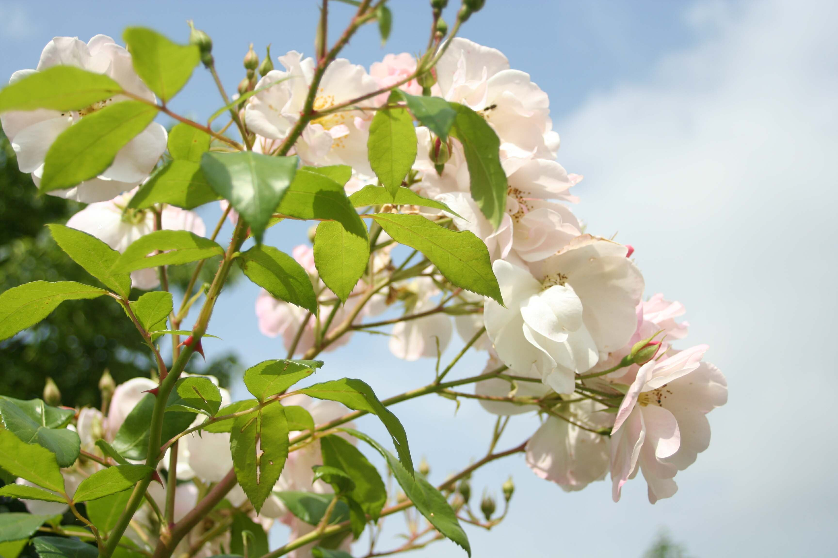 Rosa 'Nevada', de mon jardin à Épône (France)